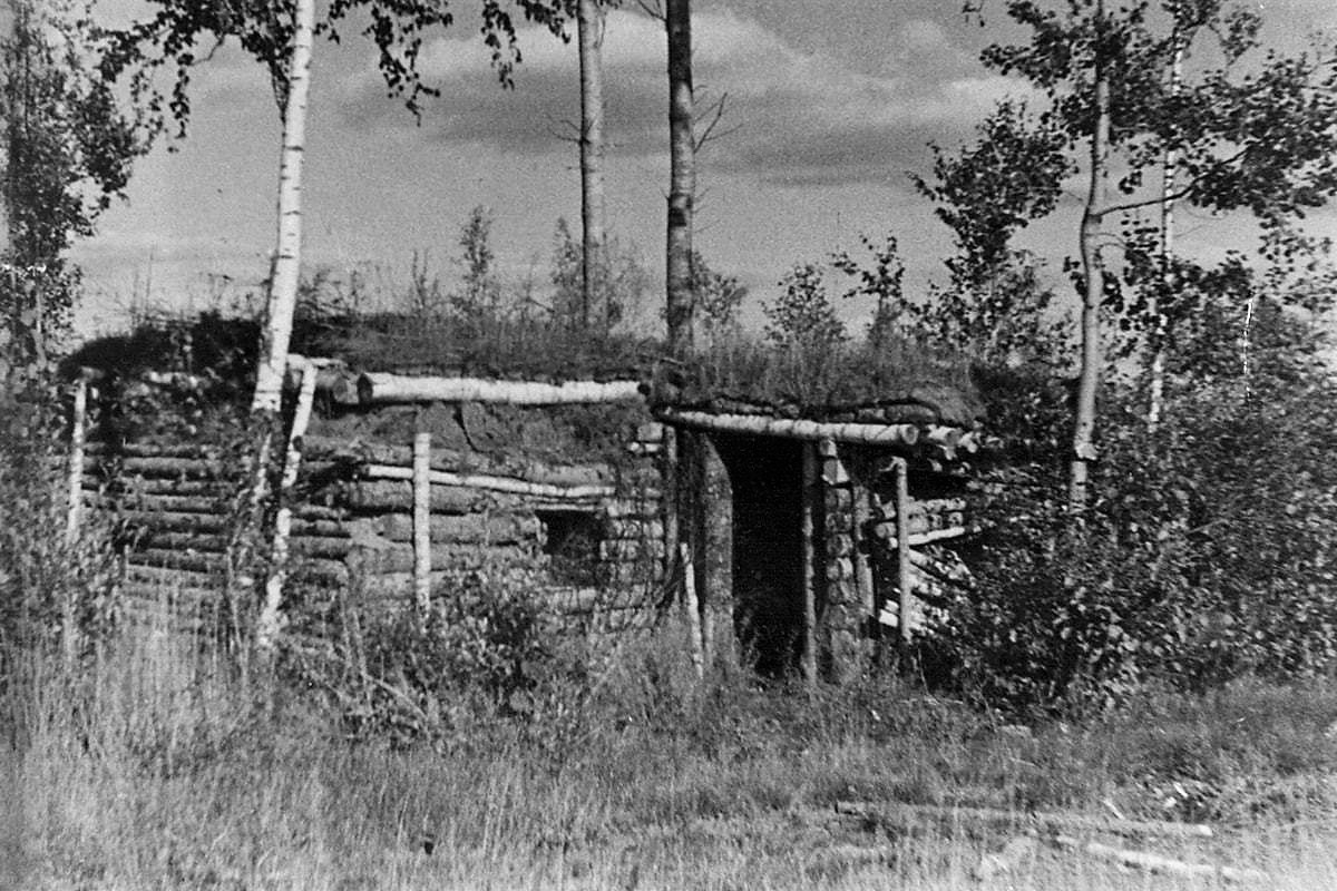 Немецкий ДЗОТ у деревни Чернушки Калининской области (ныне территория Псковской области), амбразуру которого закрыл своим телом Александр Матросов